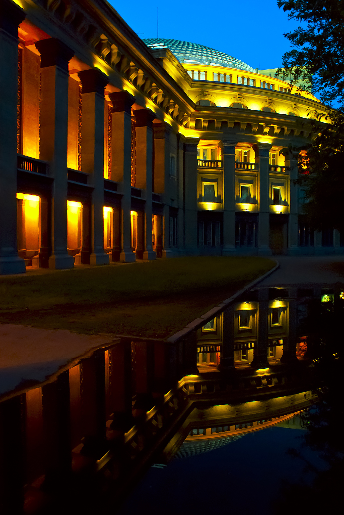 Российская Федерация, г. Новосибирск, Новосибирский театр оперы и балета